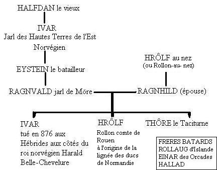 Ascendance_de_Rollon_26_02_2007.jpg